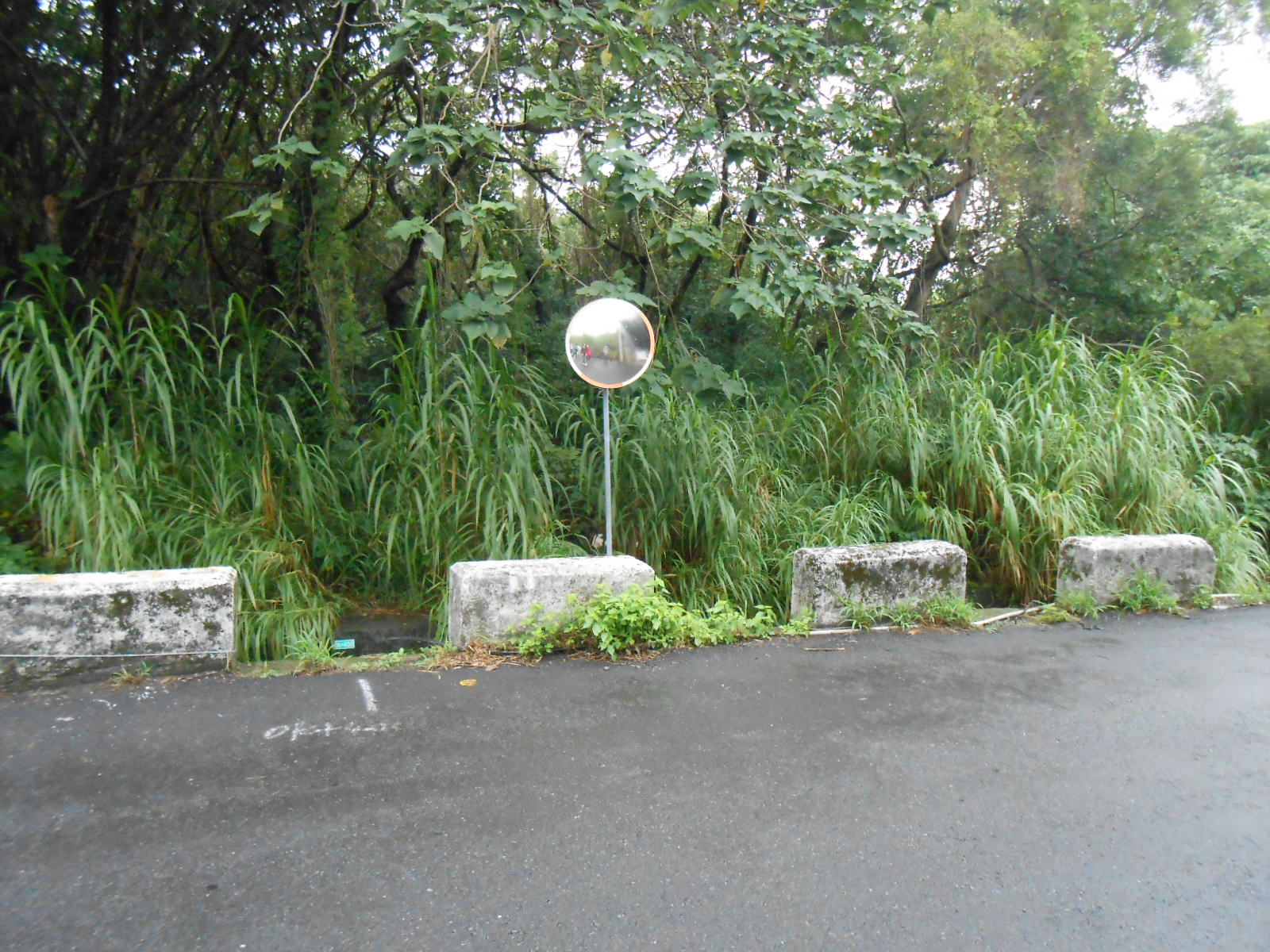 一個小型的道路安全反射鏡。